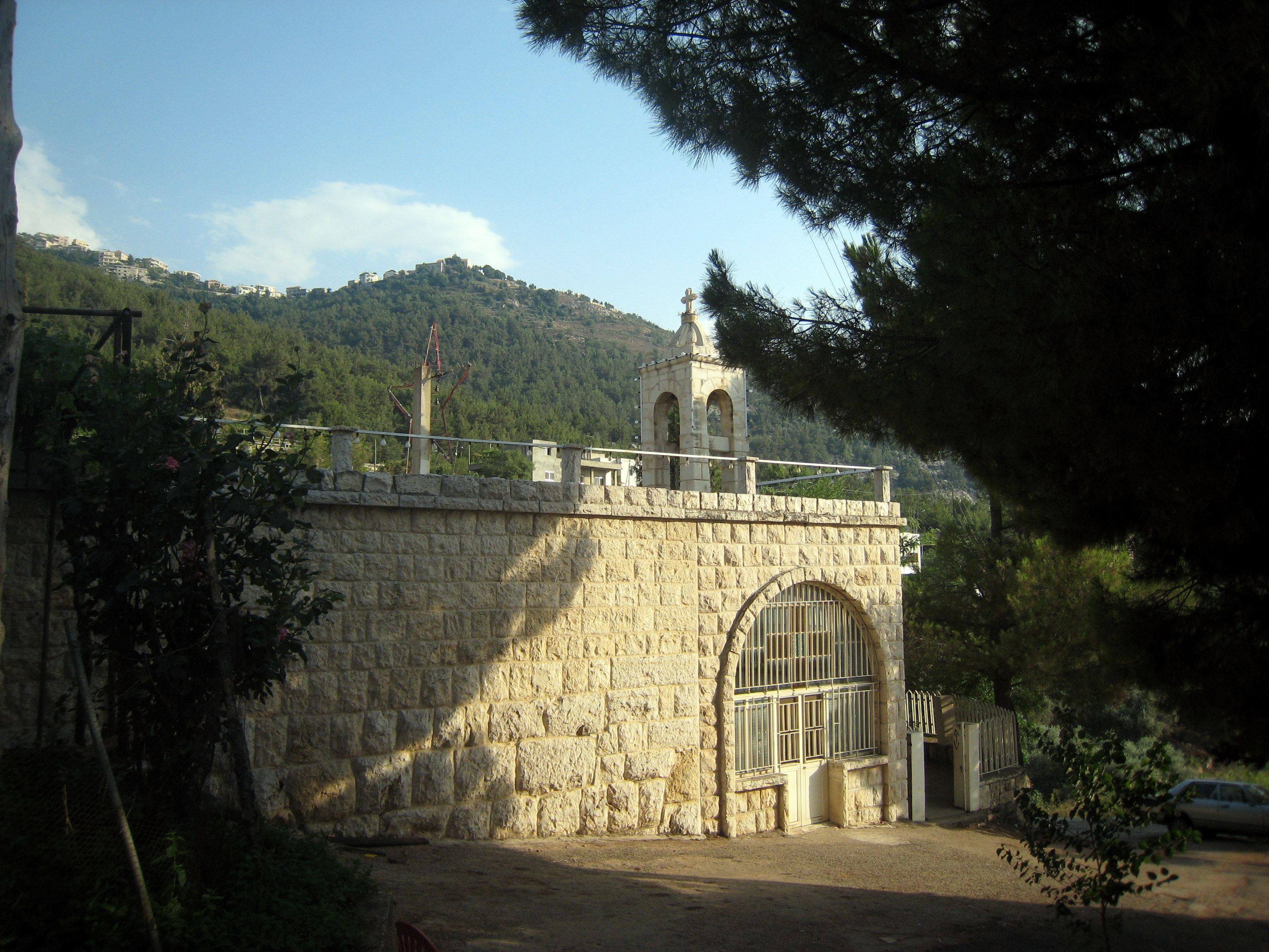 Sebhel (Liban) : l'église